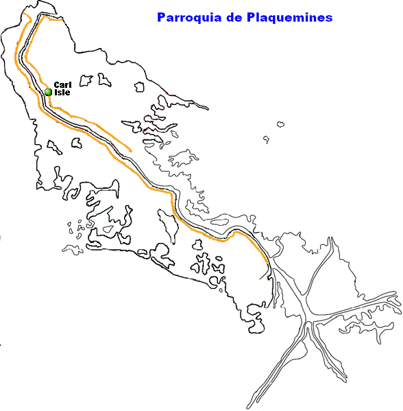 Localizador de Carl Isle (LA)